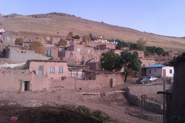 روستای پیرلوجه